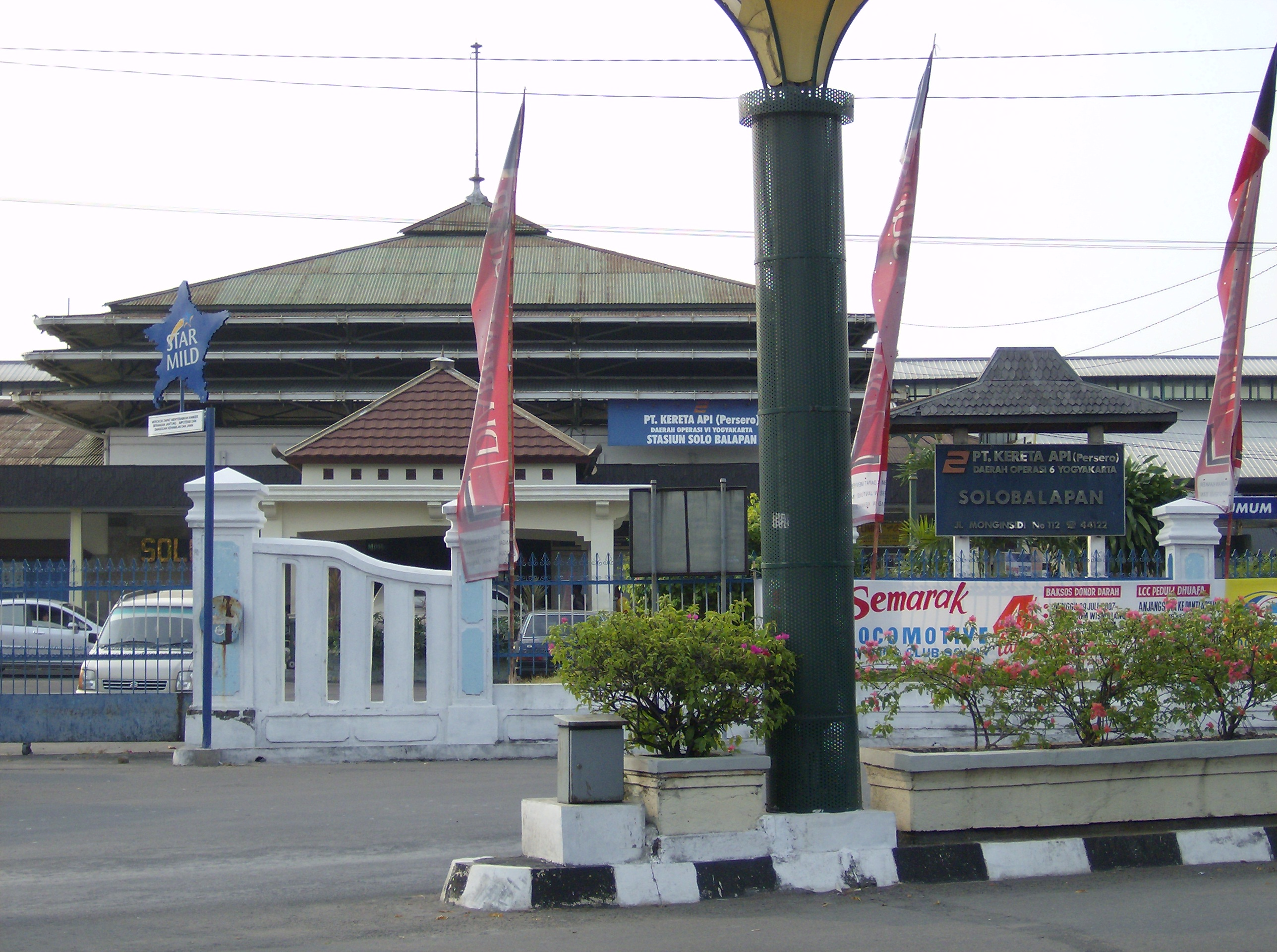 Balapan train station - Surakarta - Central Java